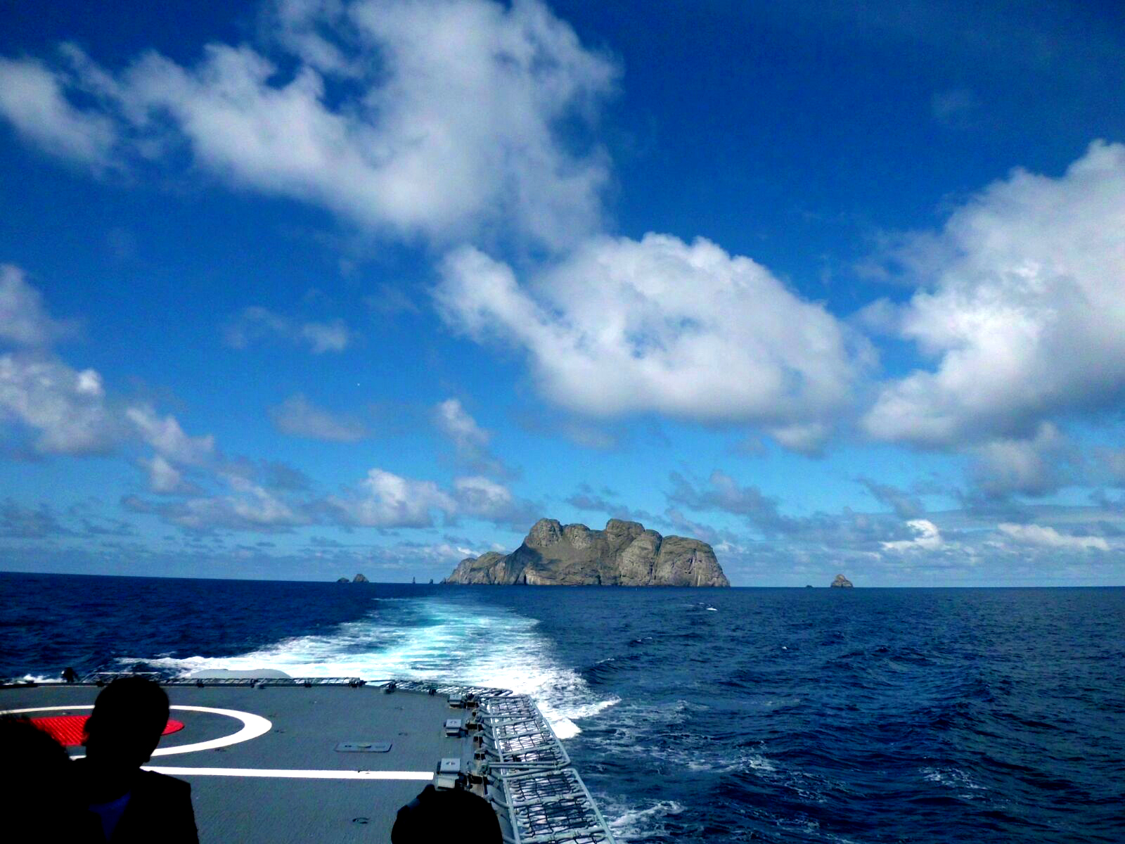 Esta fotografía fue tomada en el municipio colombiano con código 76109.